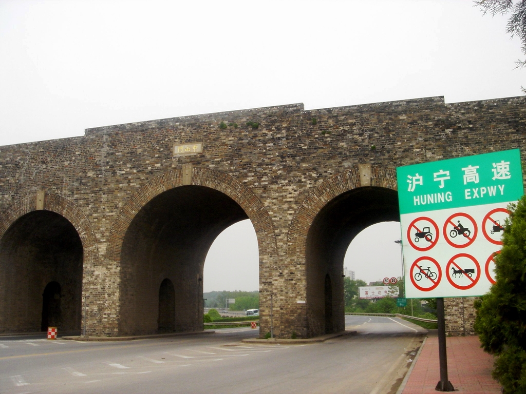 南京中山门